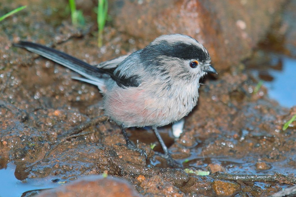 Mito Aegithalos caudatus irbii, Jerez de Los Caballeros, Extremadura, España